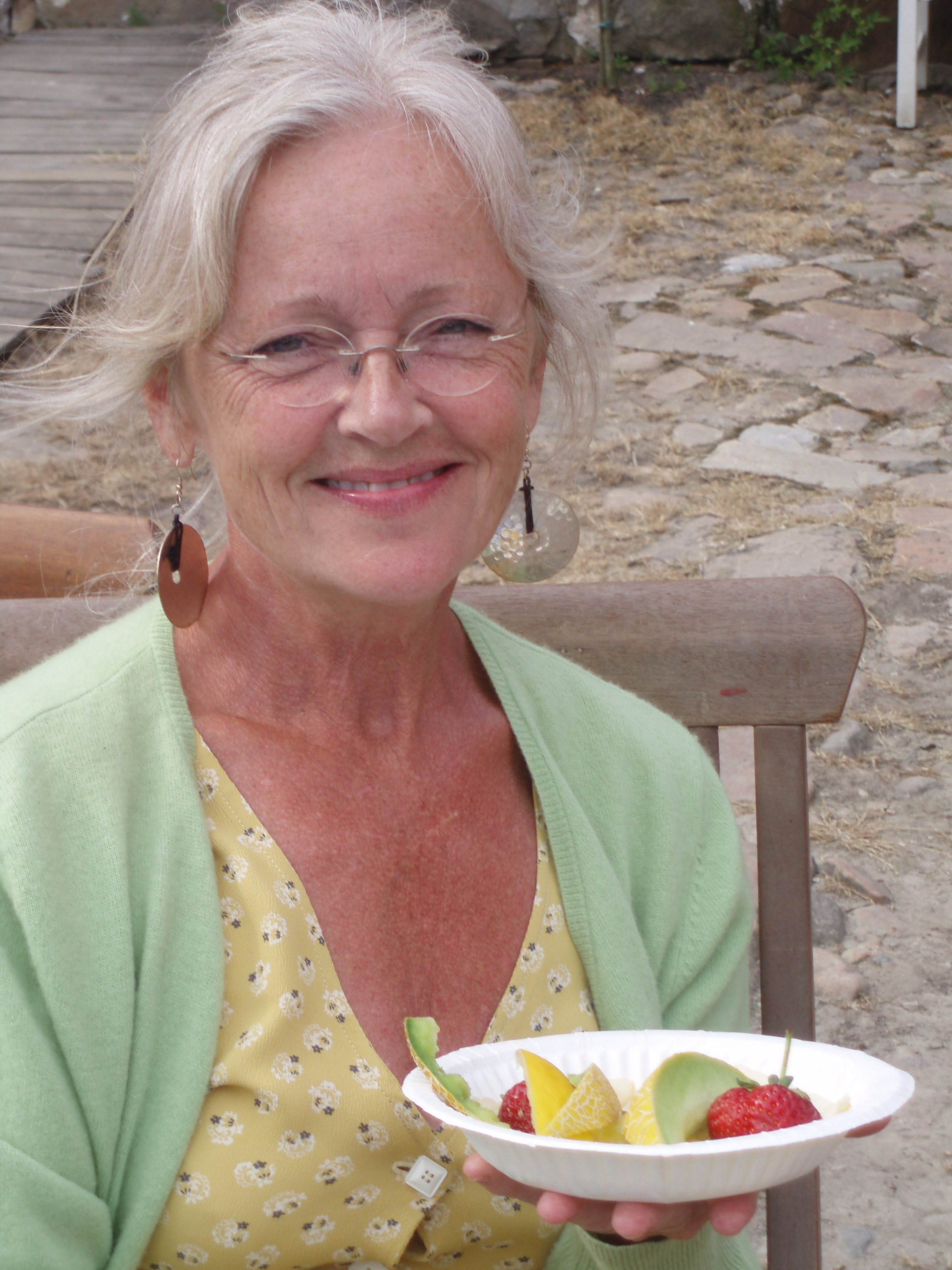 Chatarina Larsson